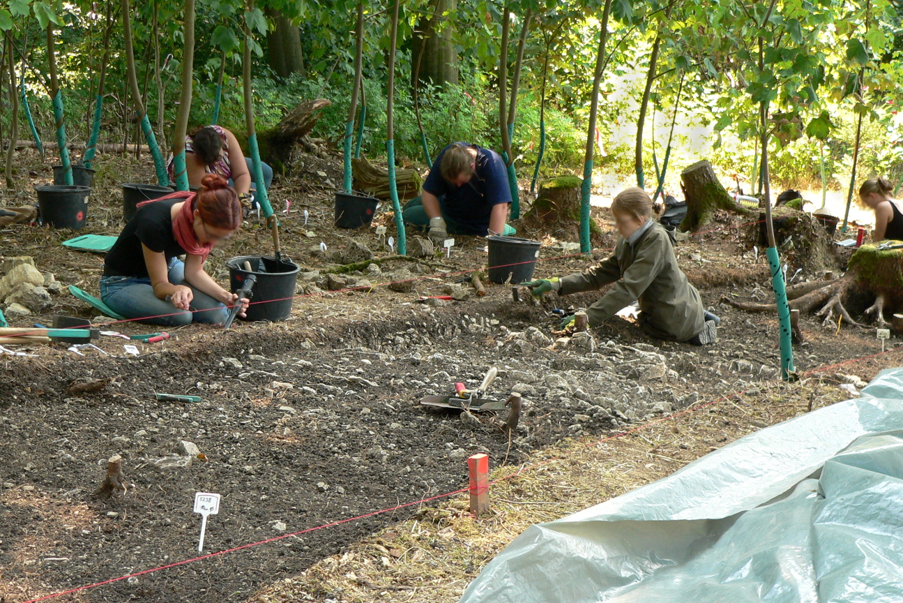 Ausgrabung am Harzhorn im Hangbereich am Hauptkamm